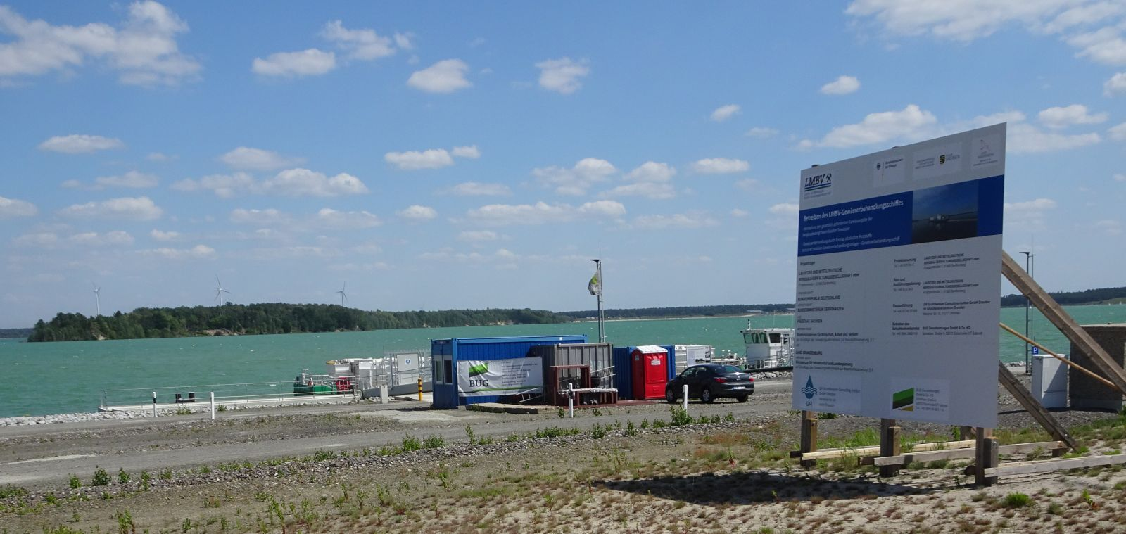 Schiff zur Gewässerbehandlung am Partwitzer See